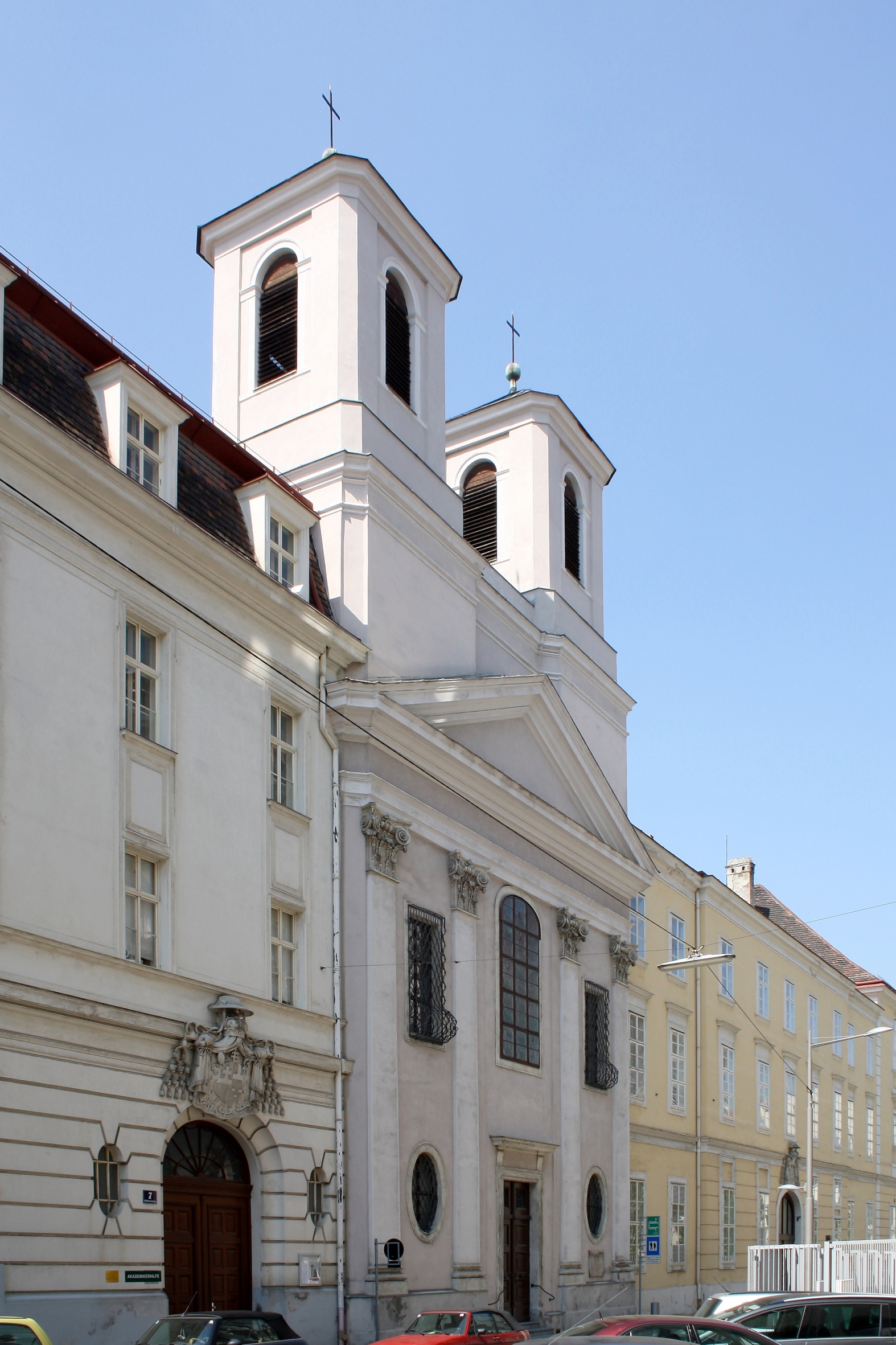 Die Seminarkirche "Santa Maria de Mercede" im ehemaligen Spanischen Spital.